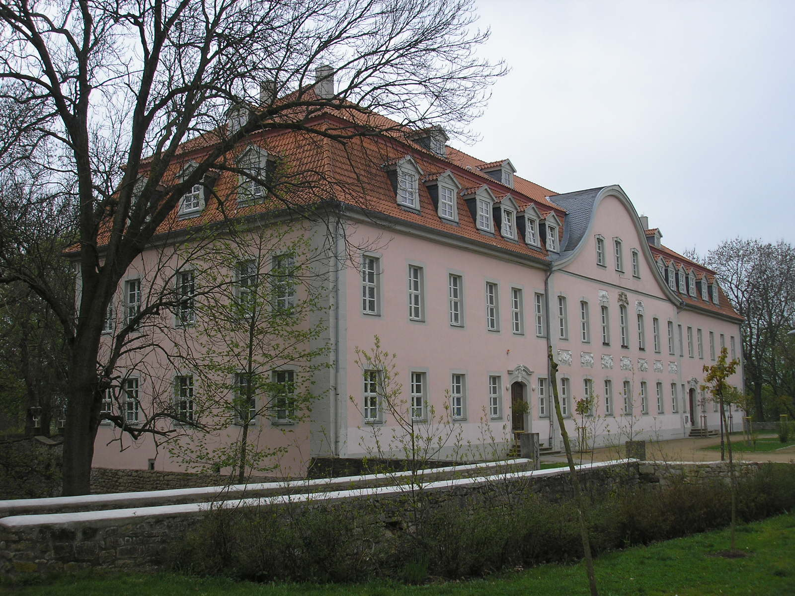 Das Schloss in Schlotheim (Thüringen).